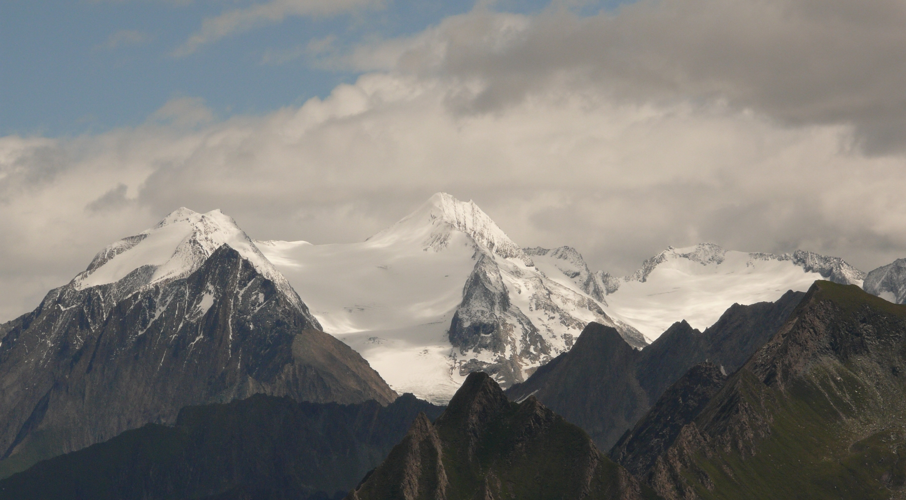 from left to right/von links nach rechts: Hochferner - Hochfeiler - Weißzint